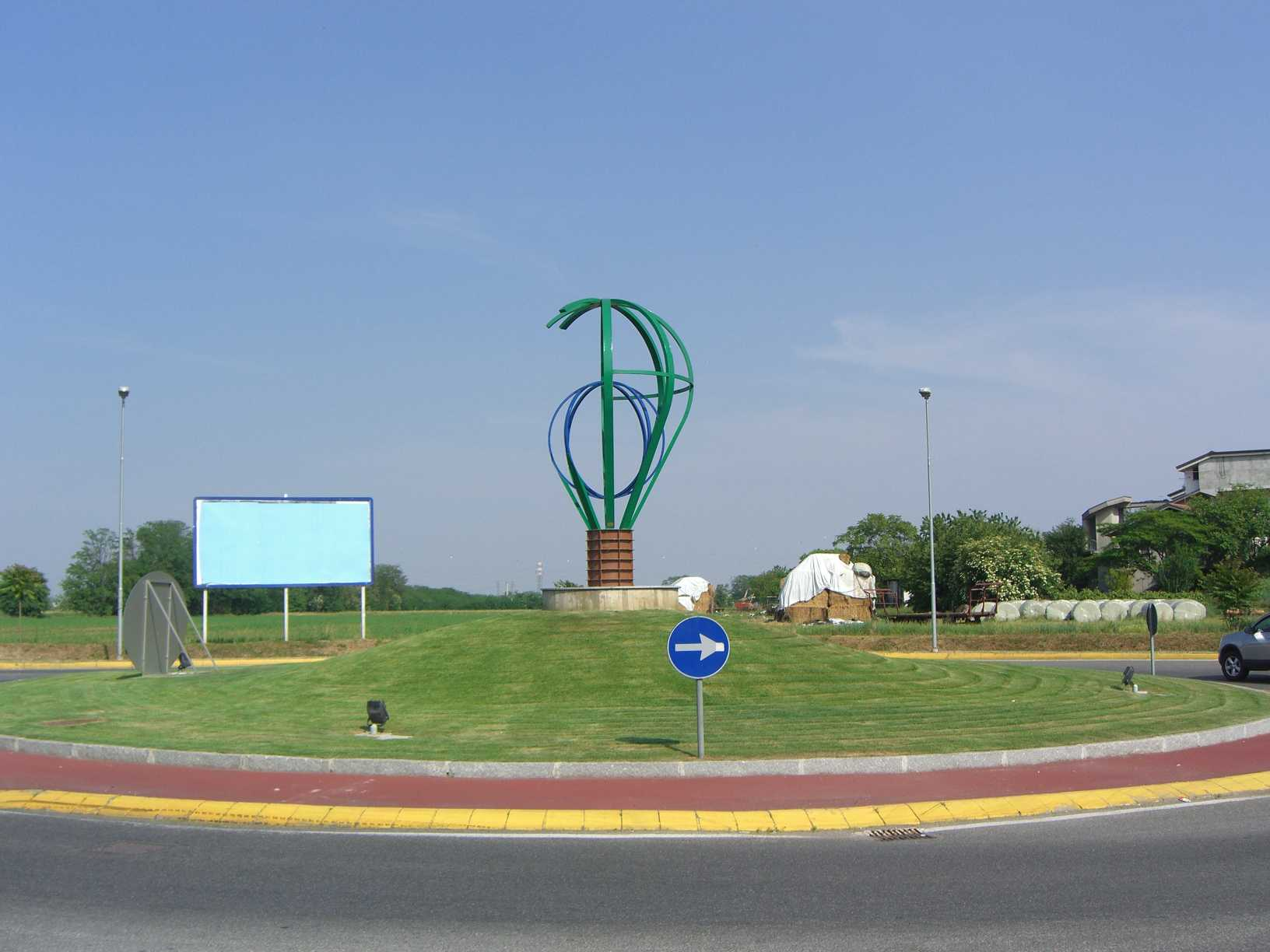 MB Brugherio monumento che ricorda una lampadina a incandescena al centro della rotatoria nella frazione San Damiano